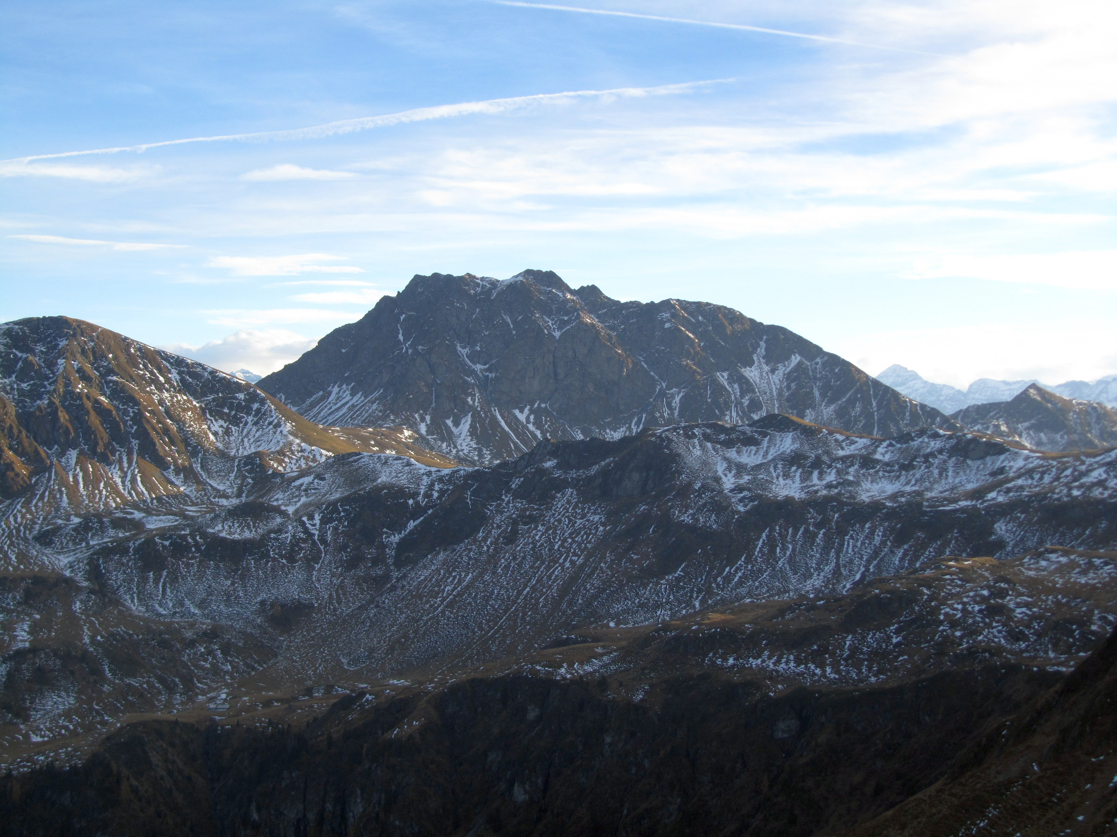 Der Geißstein in den Kitzbüheler Alpen von Norden, aufgenommen vom Saalkogel